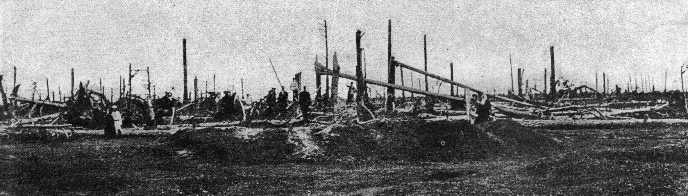 Смерч 1904 года в Москве. Анненгофская роща в Лефортово